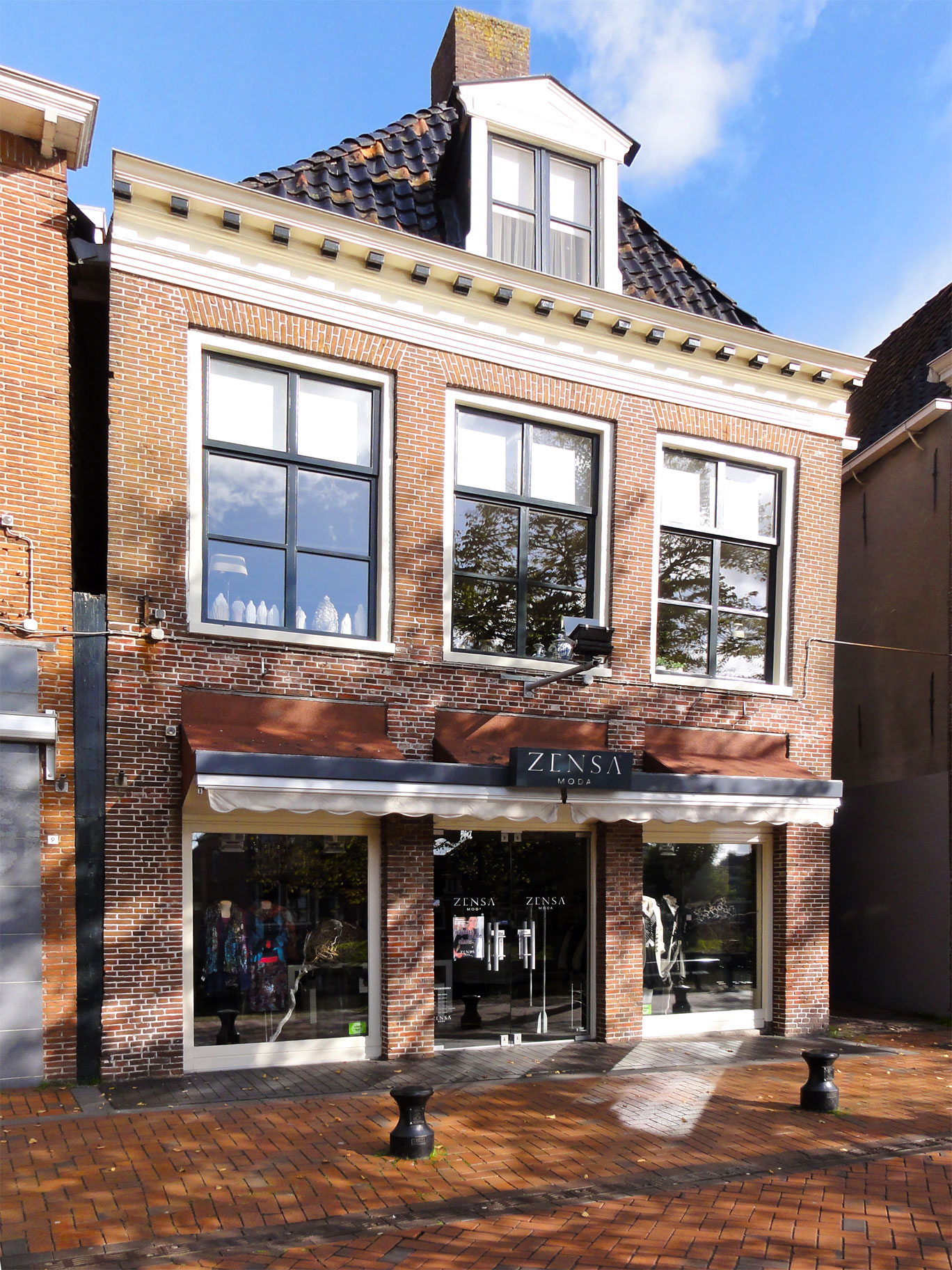 Diepswal 11 Dokkum, rijksmonument